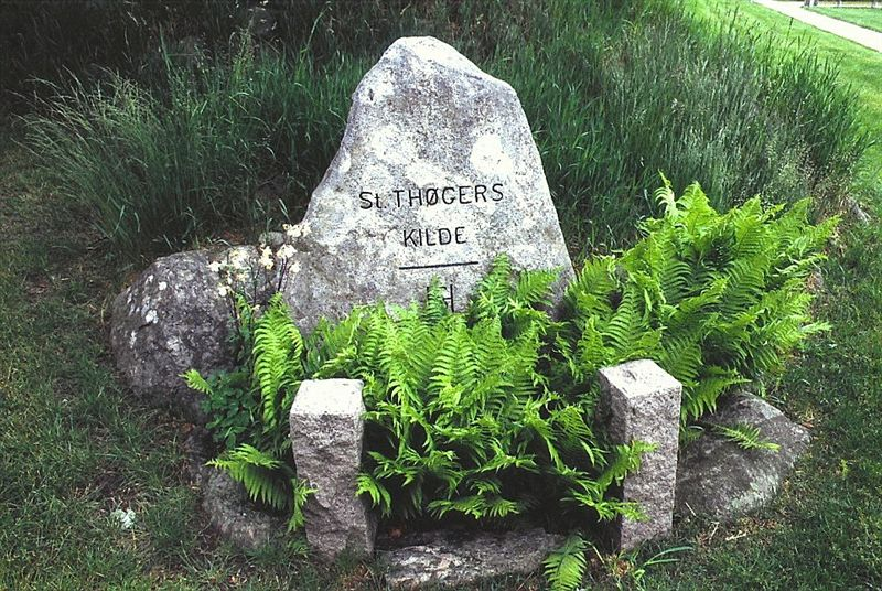 Vrensted Kirke i Danmark. Thøgerkilde ved kirkegårdens sydøst hjørne